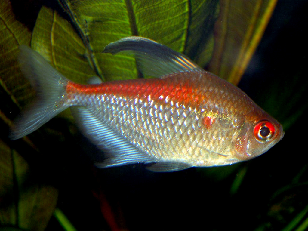 Hyphessobrycon pyrrhonotus - Rotrückenkirschflecksalmler im Aquarium